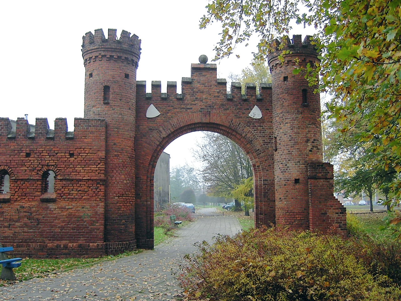 Gubin, ul. Dąbrowskiego - mury obronne z basztami, XIV-XV w. (zabytek nr 283 z 12.04.1961)